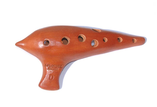 Ocarina Modell Meister